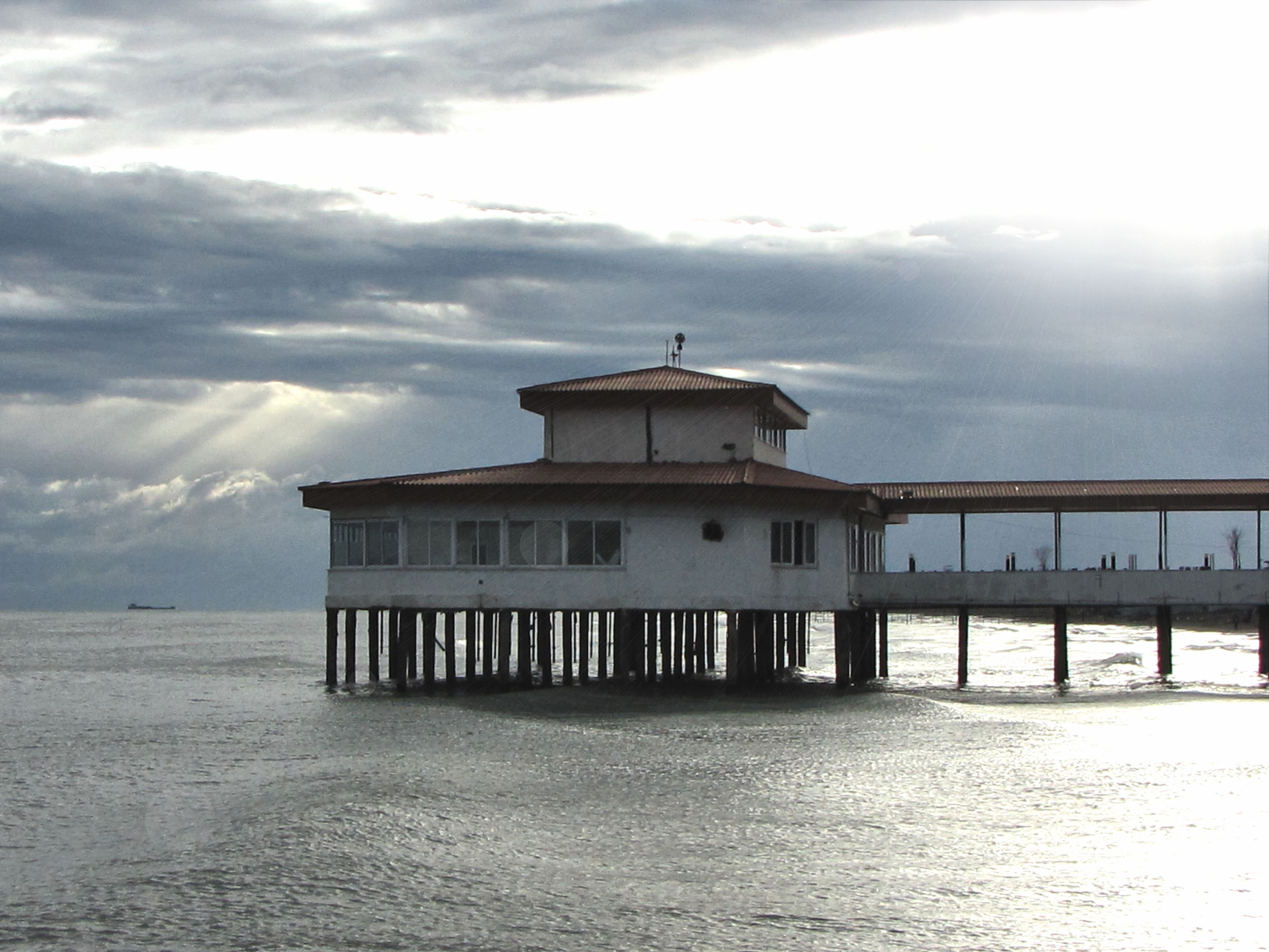 Noushahr Beach